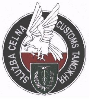 emblemat grup wzp